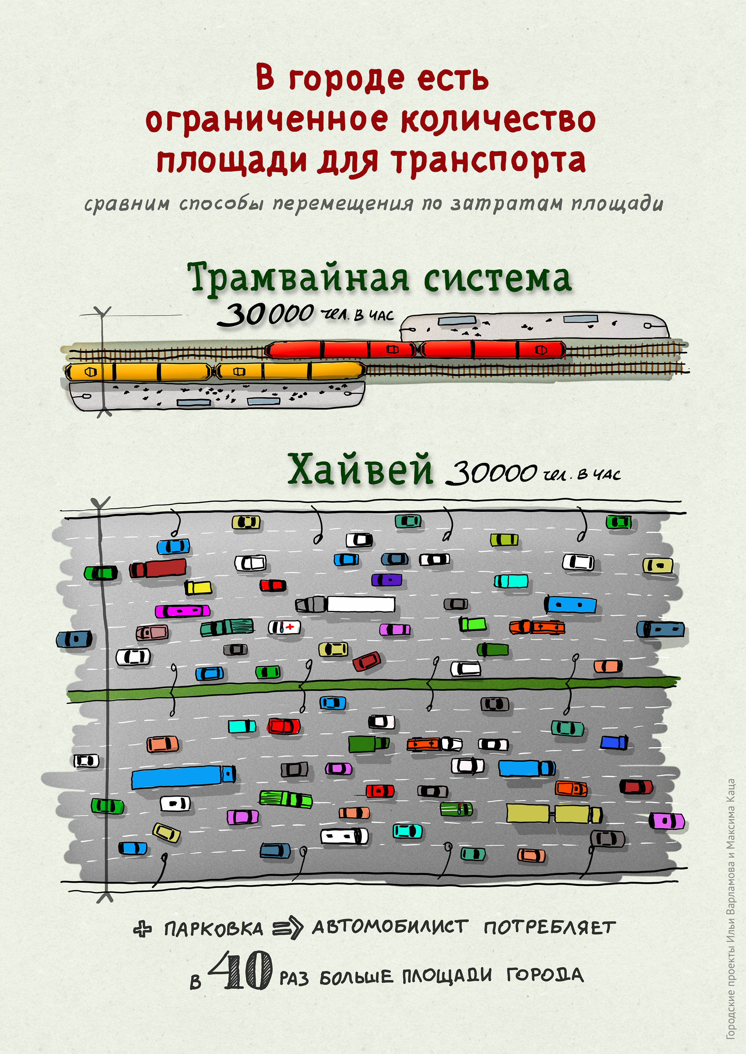 «Площадь для транспорта» — иллюстрация для «Городских проектов» Ильи Варламова и Максима Каца. Настоящим я, Евгений Решетнёв, заявляю, что являюсь законным владельцем этого изображения: Я доверяю загрузку на сервер wikimedia и проведение лицензирования этого изображения участнику kf8. Я согласен опубликовать данное изображение, на условиях свободной лицензии cc-by-3.0 или любой более новой, опубликованной Фондом Свободного Программного Обеспечения (Free Software Foundation). Я понимаю, что тем самым даю право любому лицу распространять, изменять и использовать загруженные на сервер wikimedia материалы в любых законных целях (в том числе связанных с извлечением коммерческой выгоды) при условии соблюдения указанной лицензии. Я уведомлён, что я сохраняю исключительные авторские права на свои работы вне условий указанной лицензии, и что я всегда сохраняю право на упоминание меня как автора в соответствии с выбранной лицензией. Модификации, которые сделают другие люди, не будут приписаны мне. Данное разрешение затрагивает только мои исключительные авторские права, и я оставляю за собой право предпринимать действия против использования моей работы с нарушением закона, в частности, для клеветы, унижения чести и достоинства, нарушения правил использования торговых марок, нарушения права на охрану изображения гражданина и т. д. Я понимаю, что я не могу отозвать данное разрешение, и что моя работа может размещаться в проектах Фонда Викимедиа в течение неограниченного времени, либо быть удалённой оттуда администрацией ресурса. 1.12.2012 Евгений Решетнёв Вы при желании можете связаться со мной на моём сайте